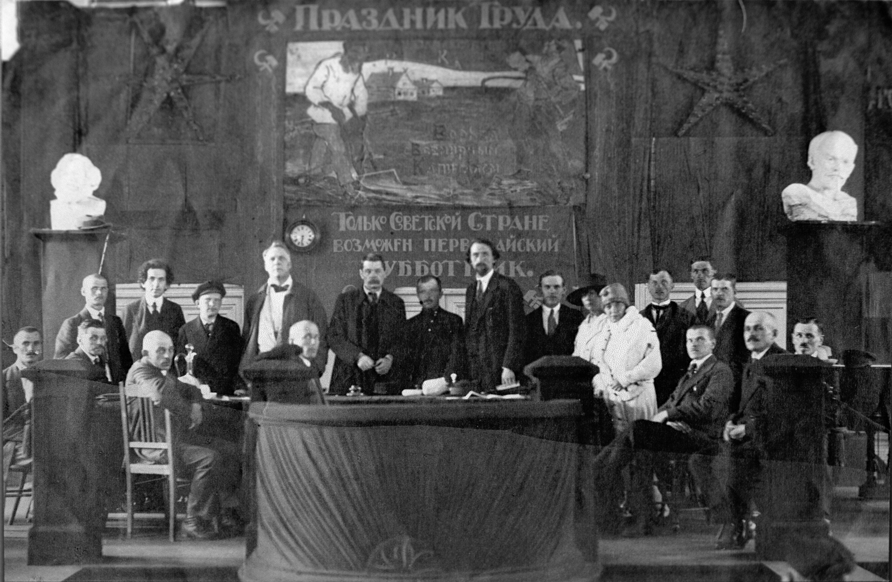 Г. Е. Зиновьев, Ф. И. Шаляпин, А. М. Горький в президиуме торжественного собрания, посвящённого празднованию 1-го мая. Петроград